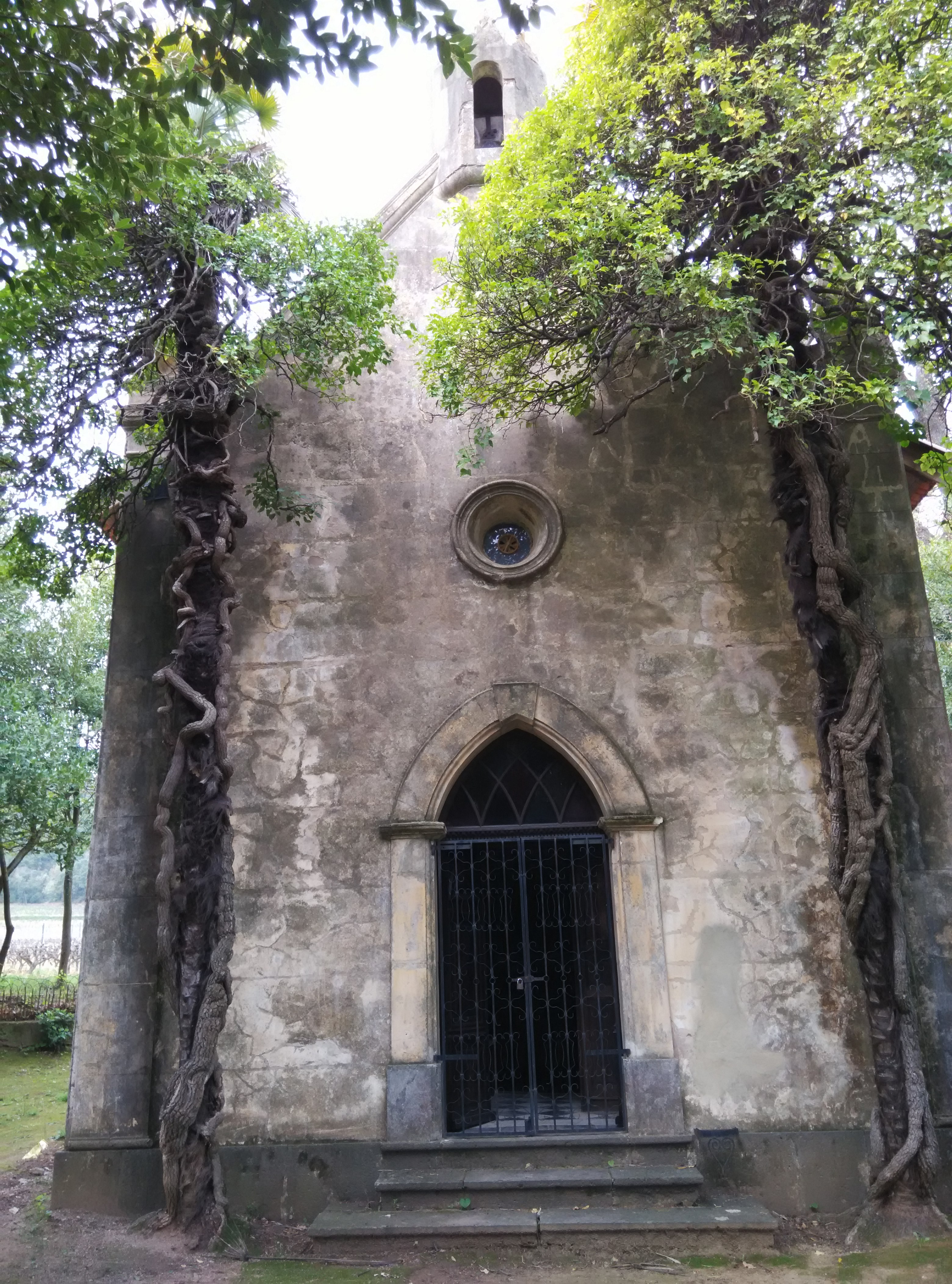 La chapelle du château Minuty à Gassin (Côte d'Azur, France)